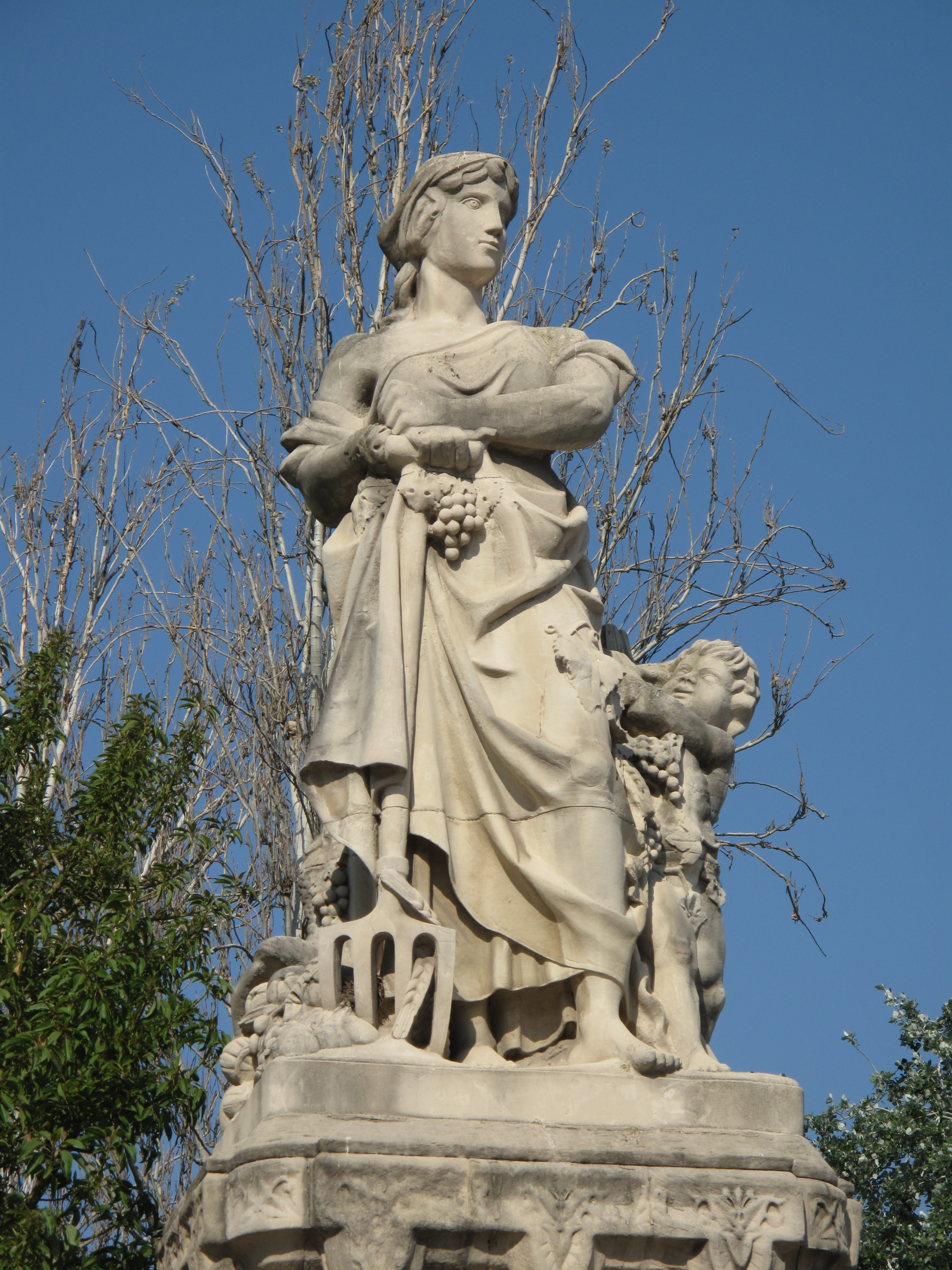 Al·legoria de l'Agricultura, de Venanci Vallmitjana, a la porta d'accés al parc de la Ciutadella pel passeig de Picasso (Barcelona)